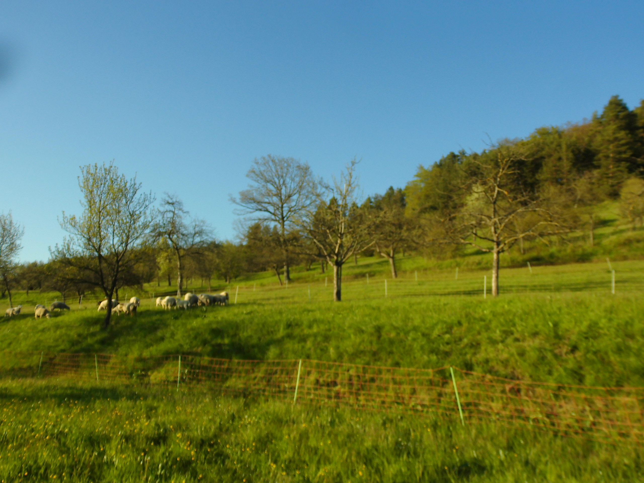 Schafbeweidung im Naturschutzgebiet Volmershalde östlich von Hemmendorf